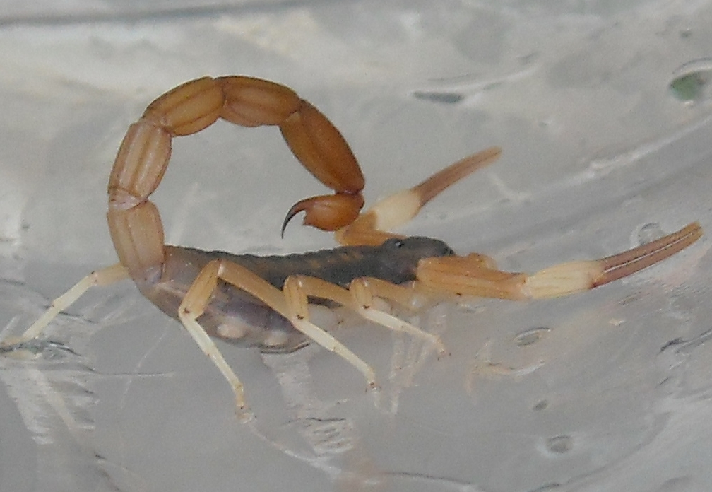 Fotografía de escorpión Tityus trivittatus tomada en la ciudad de Rafaela, Provincia de Santa Fe - Argentina - By Walter L. Rohrmann